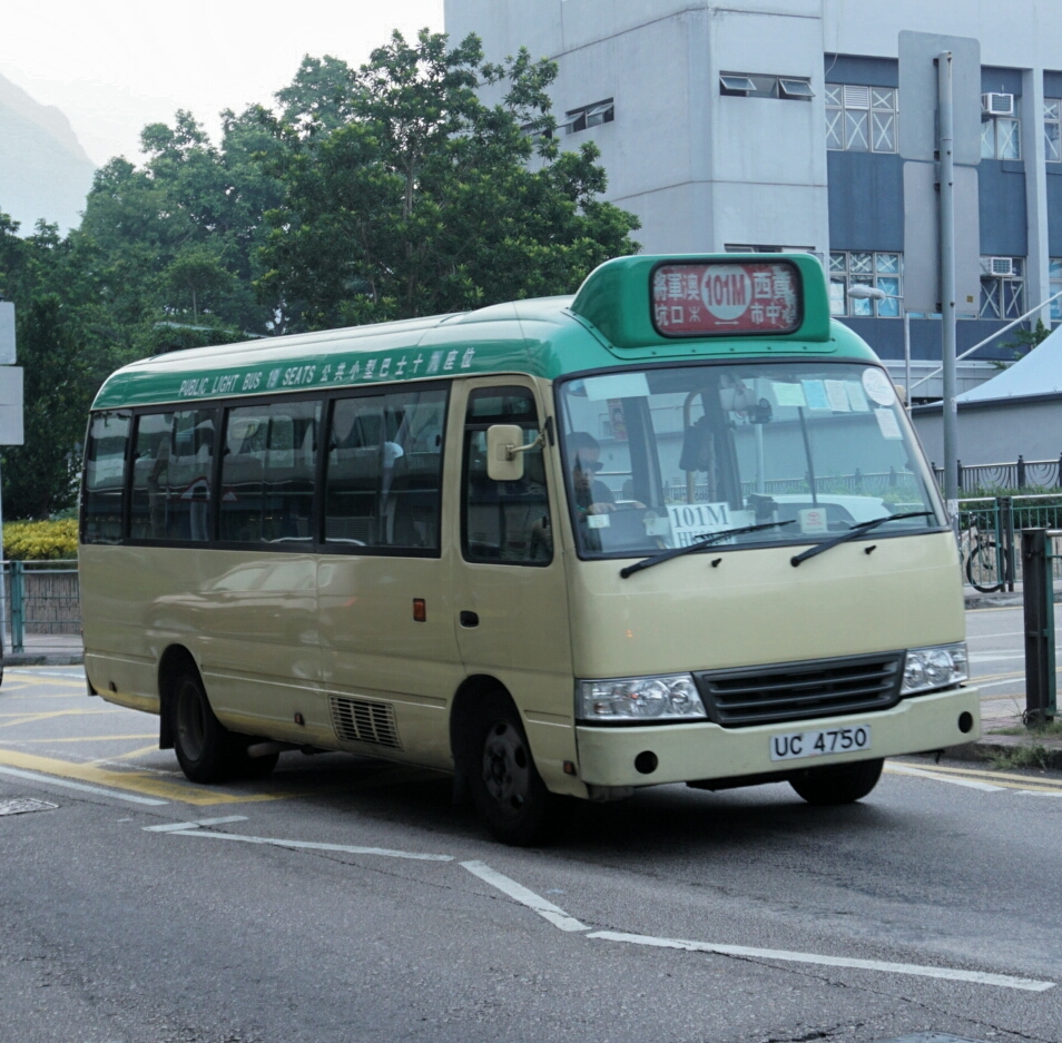 中文（香港）: 新界區專線小巴101M線，正途經福民路前往西貢碼頭